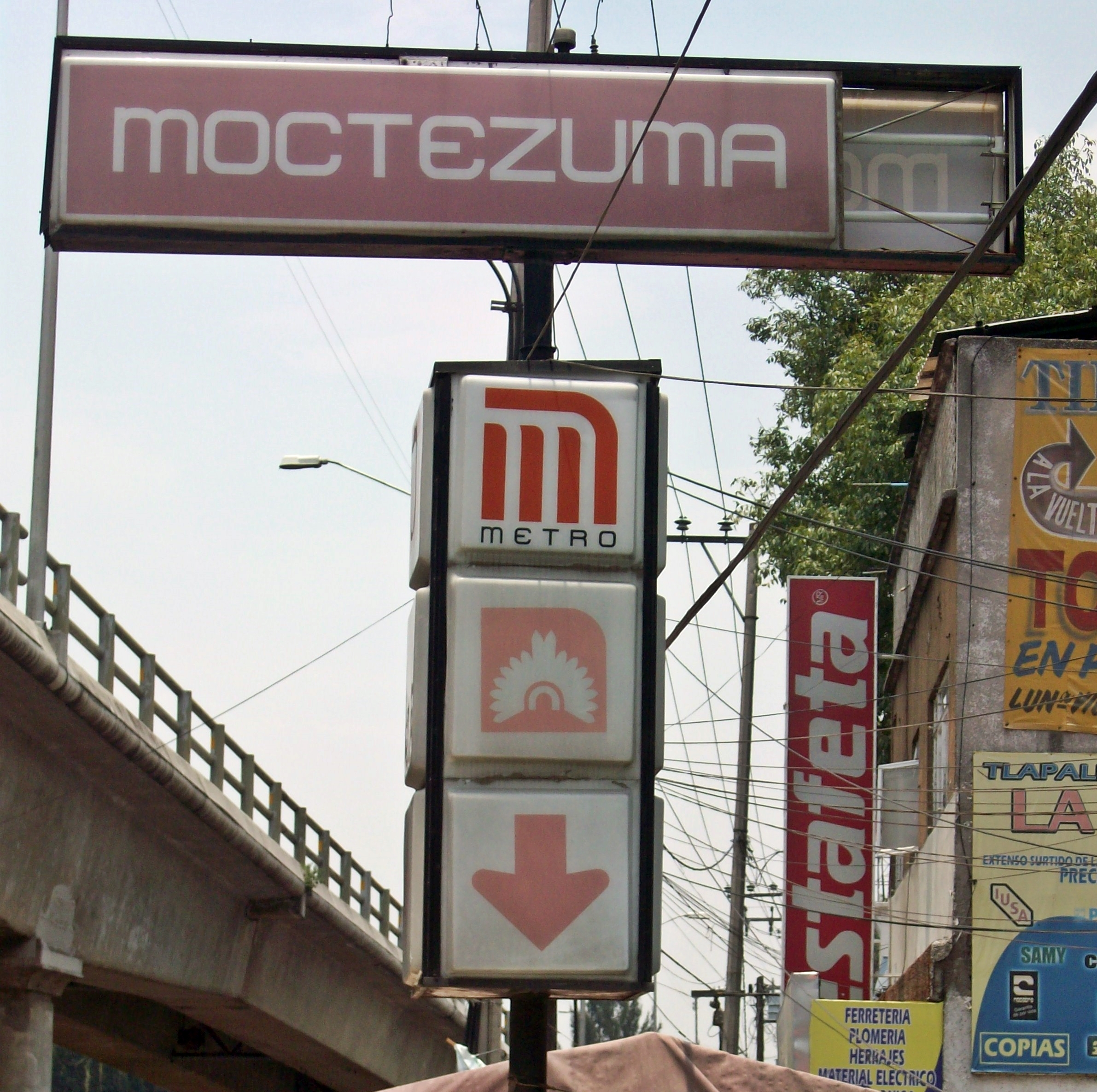 Estela estacion Moctezuma